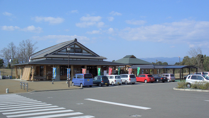 道の駅錦 写真は地域振興施設部分。 撮影者/著者/著作権保有者 : MK Products (本人がアップロード) 撮影日 : 2007/03/14 一武駅用にアップロードした画像です。良い画像があれば別の画像に変えてください。